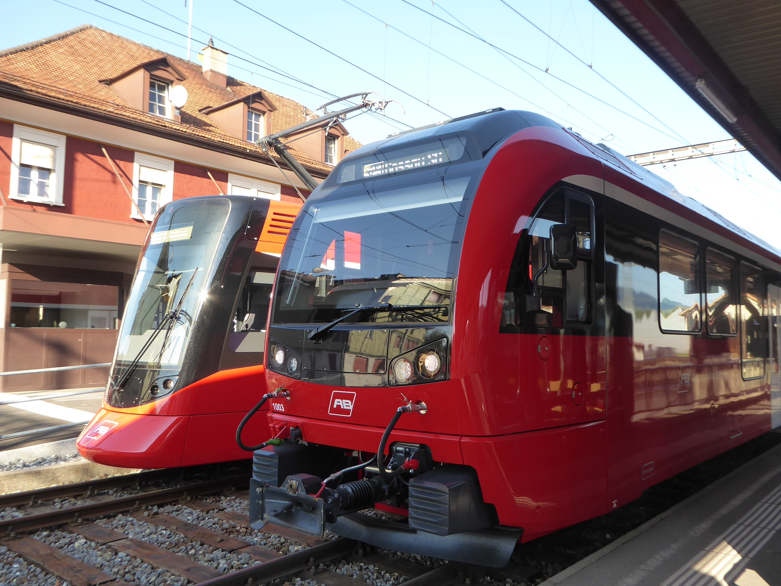 ABe 4/12 „Walzer“ (vorne) und ABe 8/12 „Tango“ der Appenzeller Bahnen (AB) im Bahnhof Appenzell